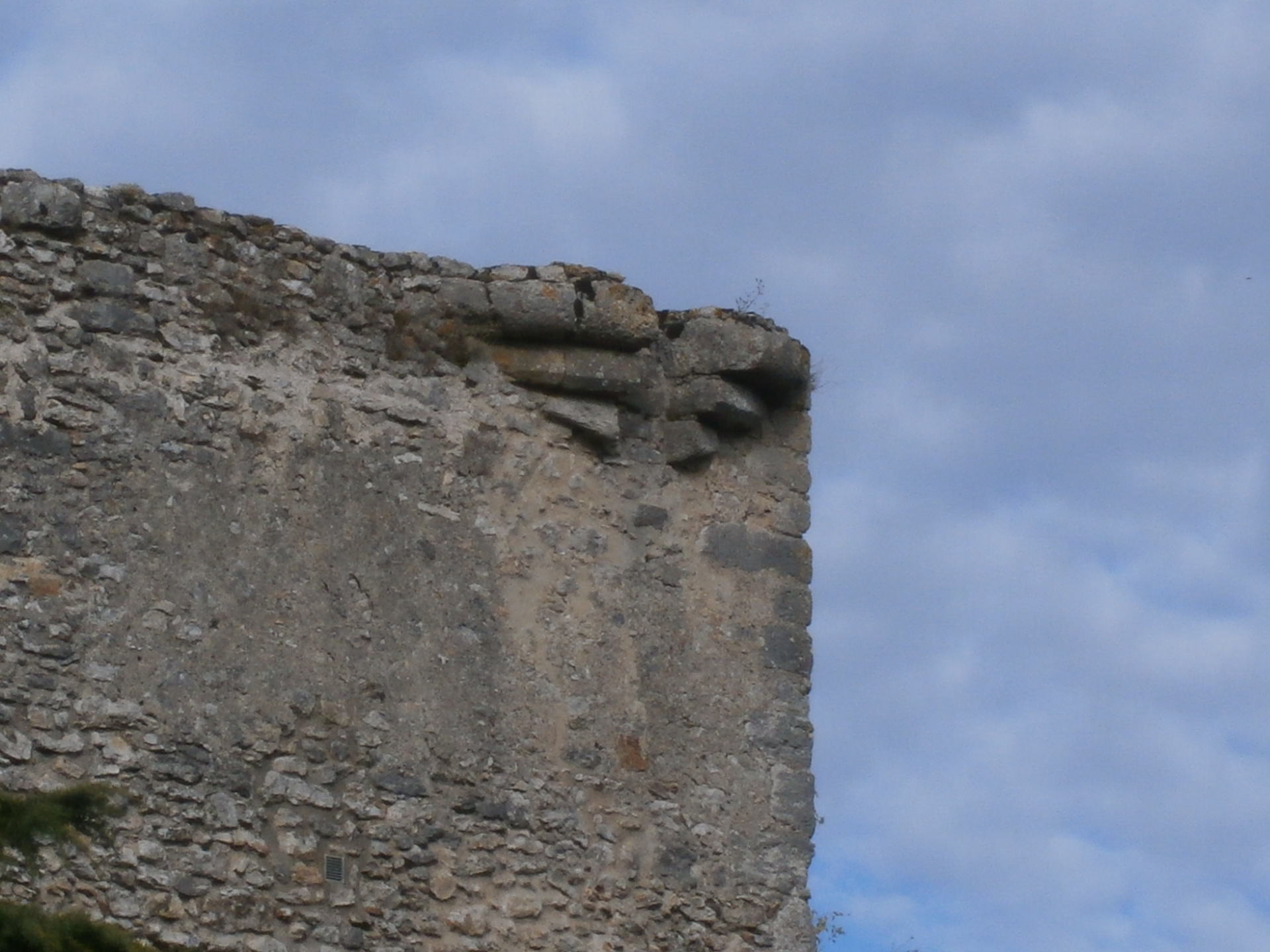 Détail d'un cul-de-lampe à l'angle du donjon